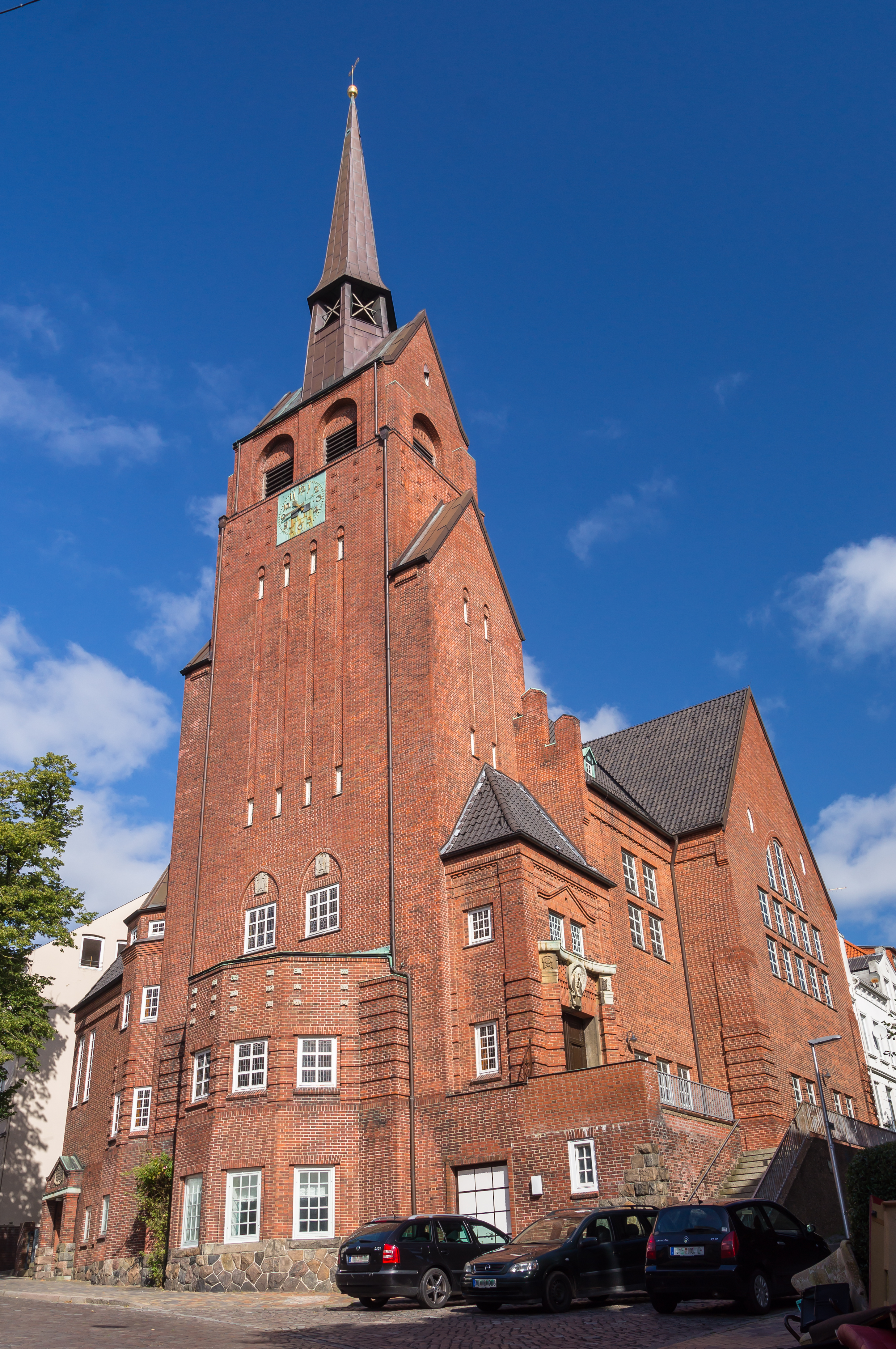 Flensburg-Nordstadt; Bauer Landstrasse 10; Kirche St. Petri; Denkmal-Nr. 7